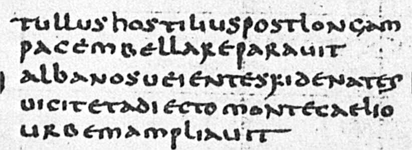 Handschriftliches Beispiel für Unzialschrift.